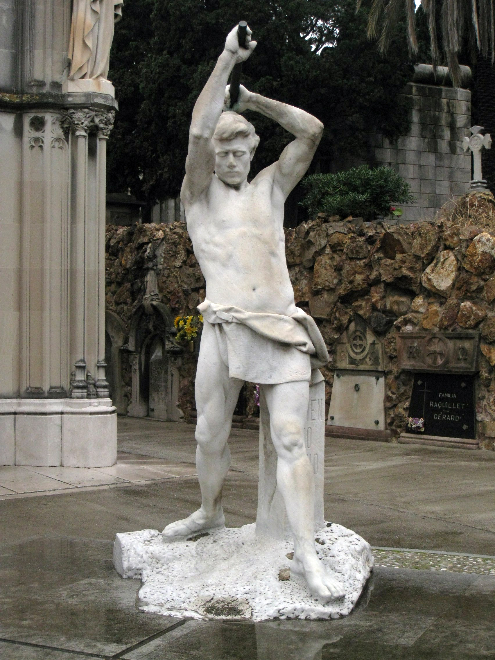 Cementiri de Montjuïc (Barcelona) Object location41° 21′ 12.93″ N, 2° 09′ 17.93″ E